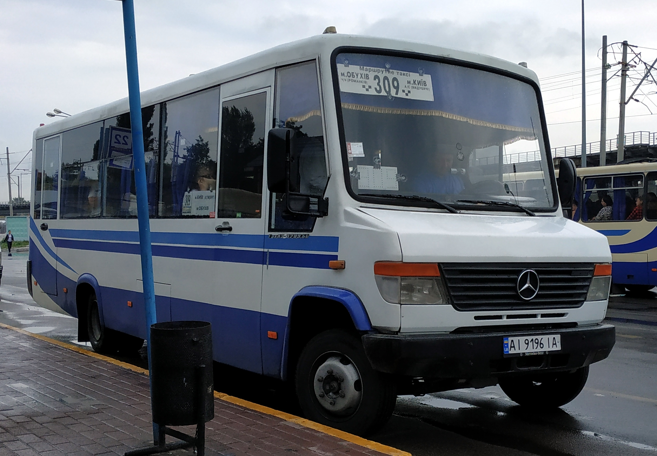 Автобус ГалАЗ-3209.60, Киев, автостанция Выдубичи, 2019 г.